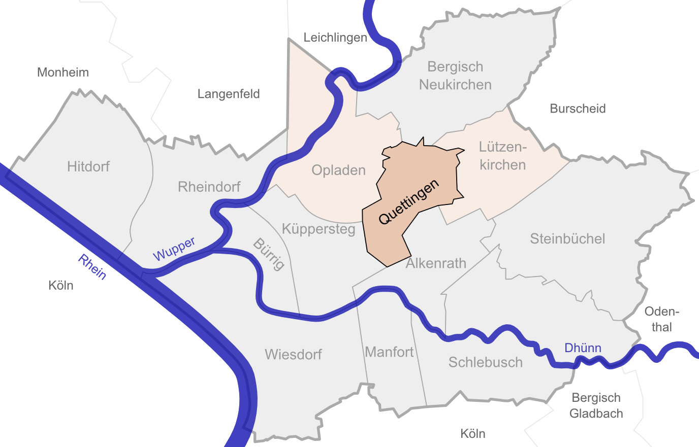 Lage von Quettingen in Leverkusen bzw. in der ehemaligen Stadt Opladen (farbig markiert)